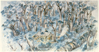 開拓小屋の建設（「札幌村開拓絵巻」より）